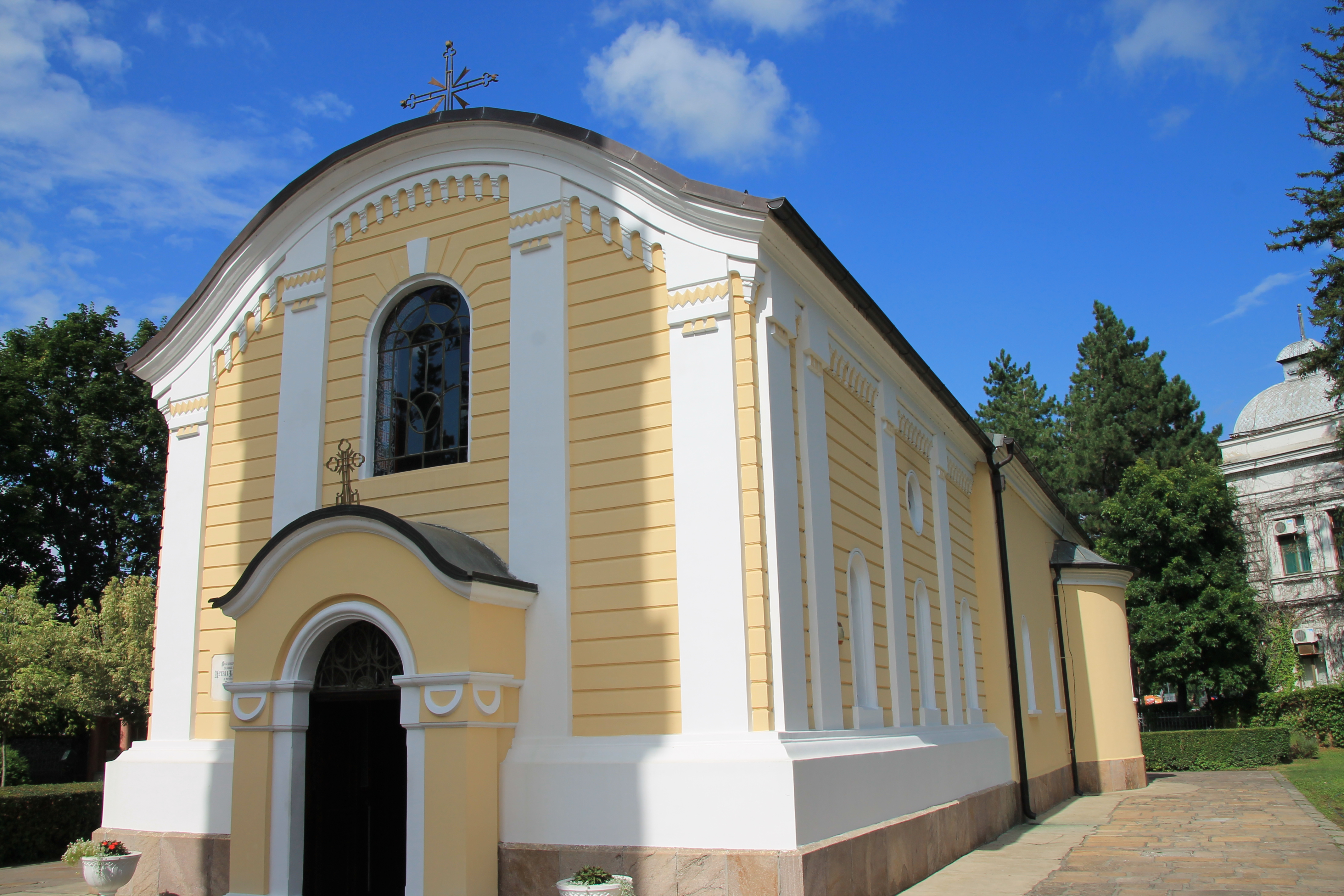 Stara crkva (Kragujevac)